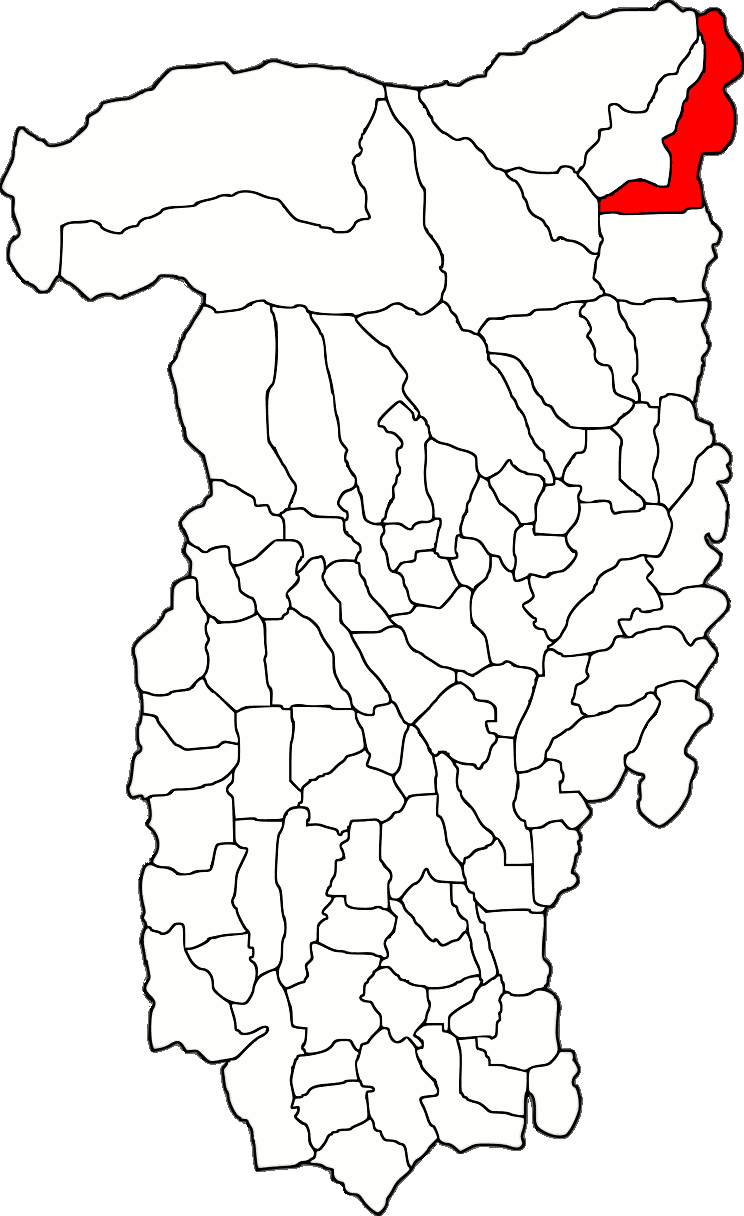 Lage der Gemeinde Titești im Kreis Vâlcea (RO).